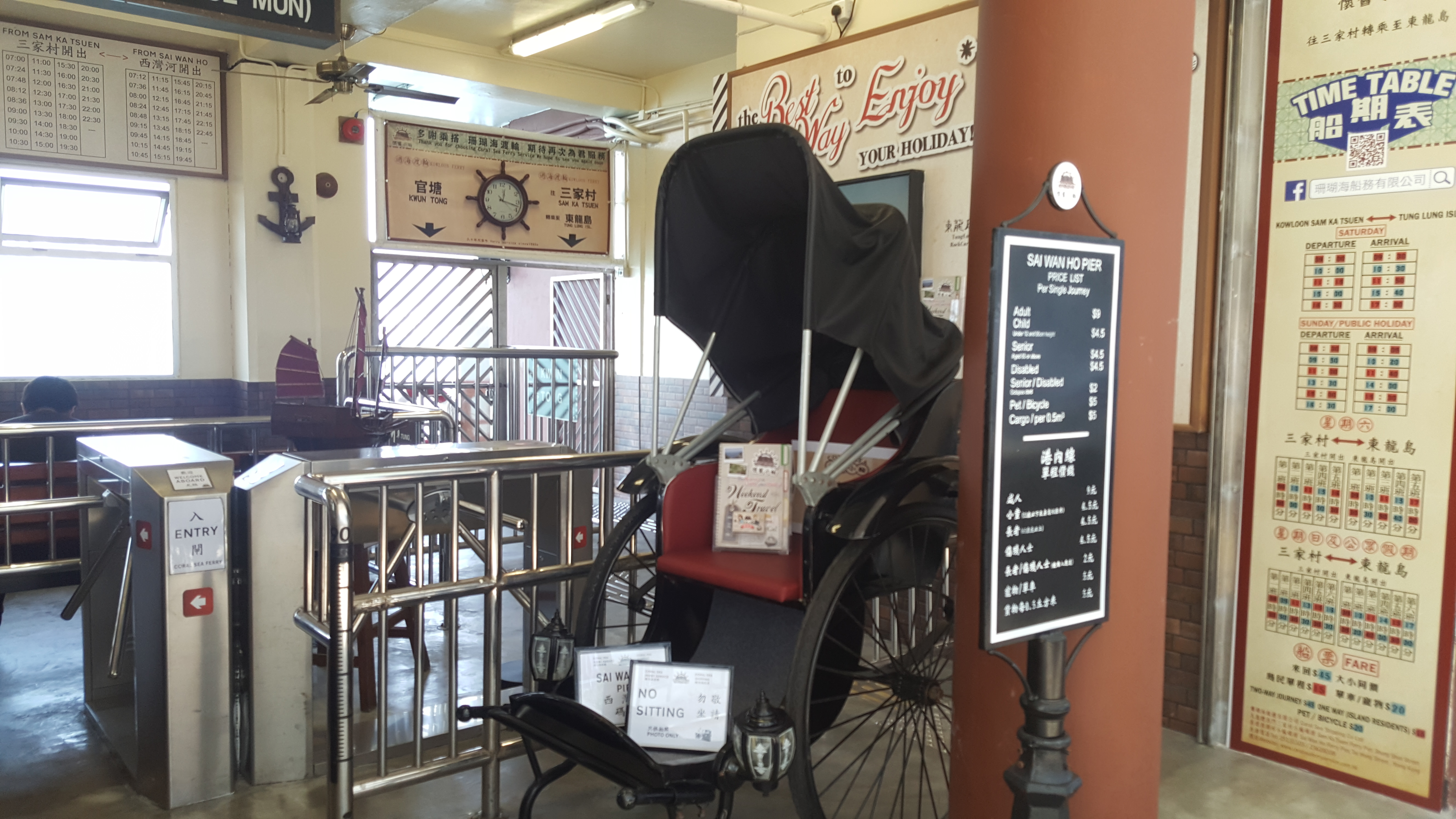 中文（香港）: 全新面貌西灣河渡輪碼頭